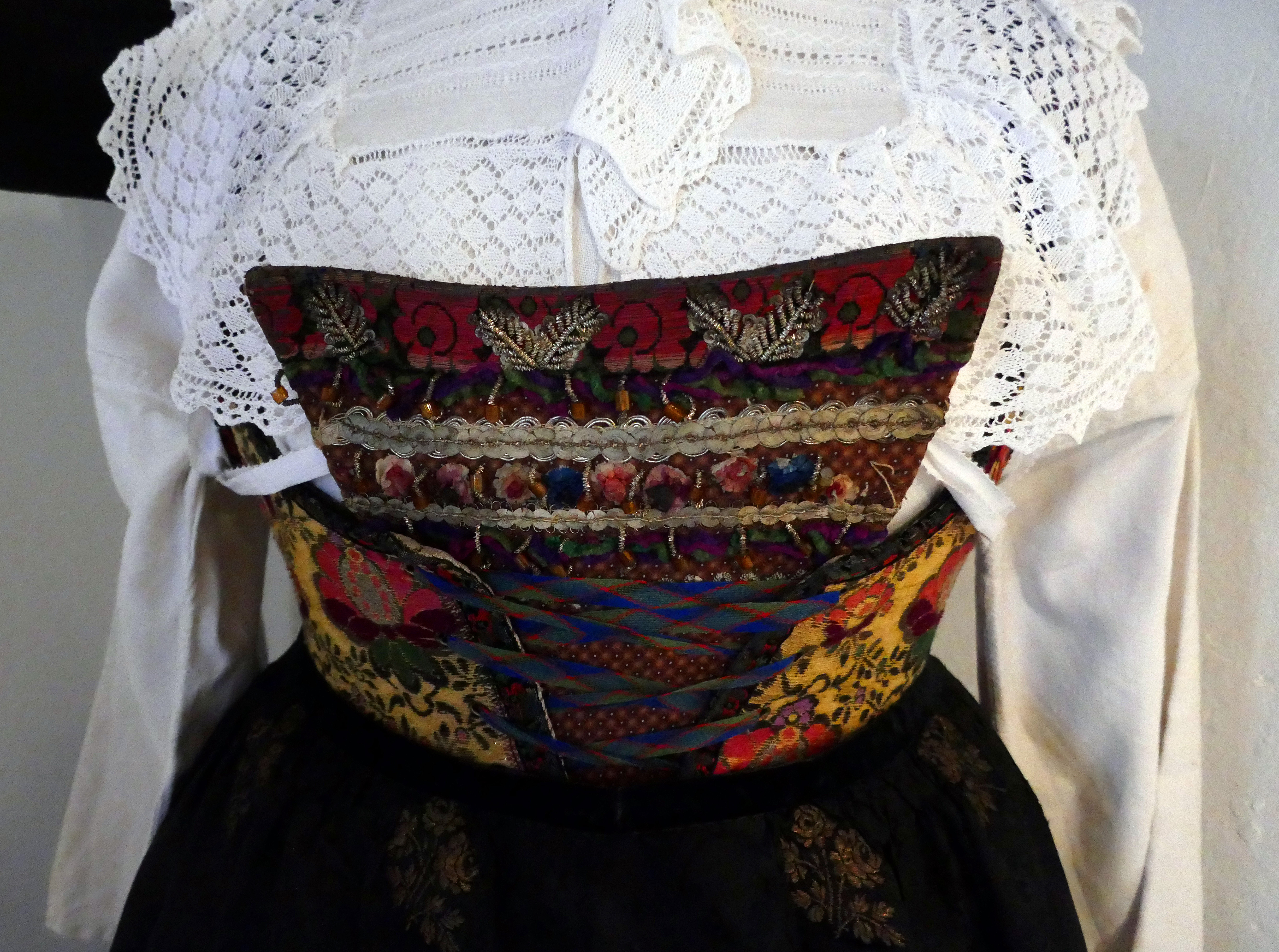 Plastron du costume de femme protestante du Pays de Hanau. Fin du XIXe siècle. Soie, laine, lin, coton, métal. Musée alsacien de Strasbourg/Collection particulière. Exposition temporaire Costumes d'Alsace, étoffes d'un monde au Musée alsacien de Strasbourg (2018).